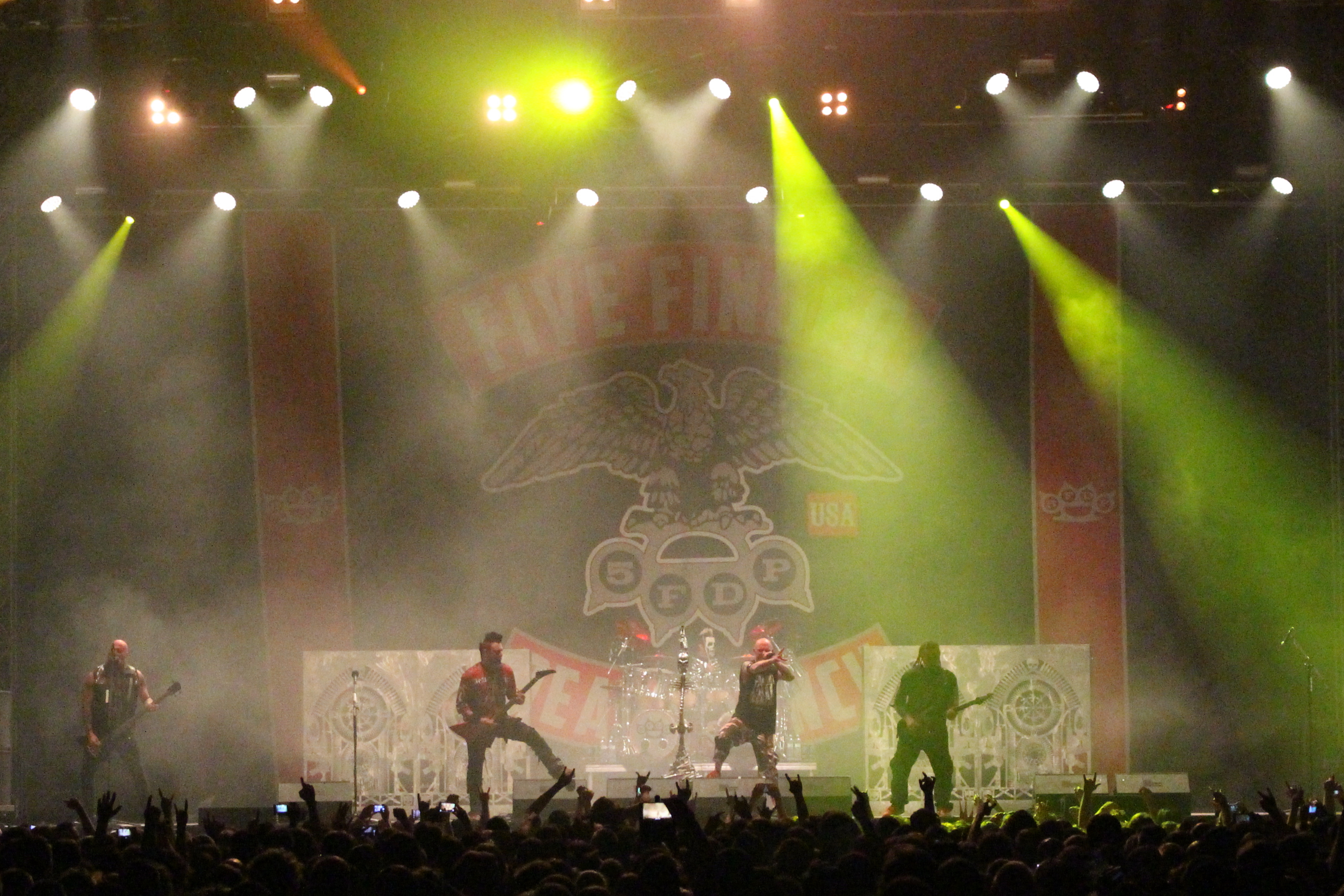 Festivalsommer This photo was created with the support of donations to Wikimedia Deutschland in the context of the CPB project "Festival Summer".